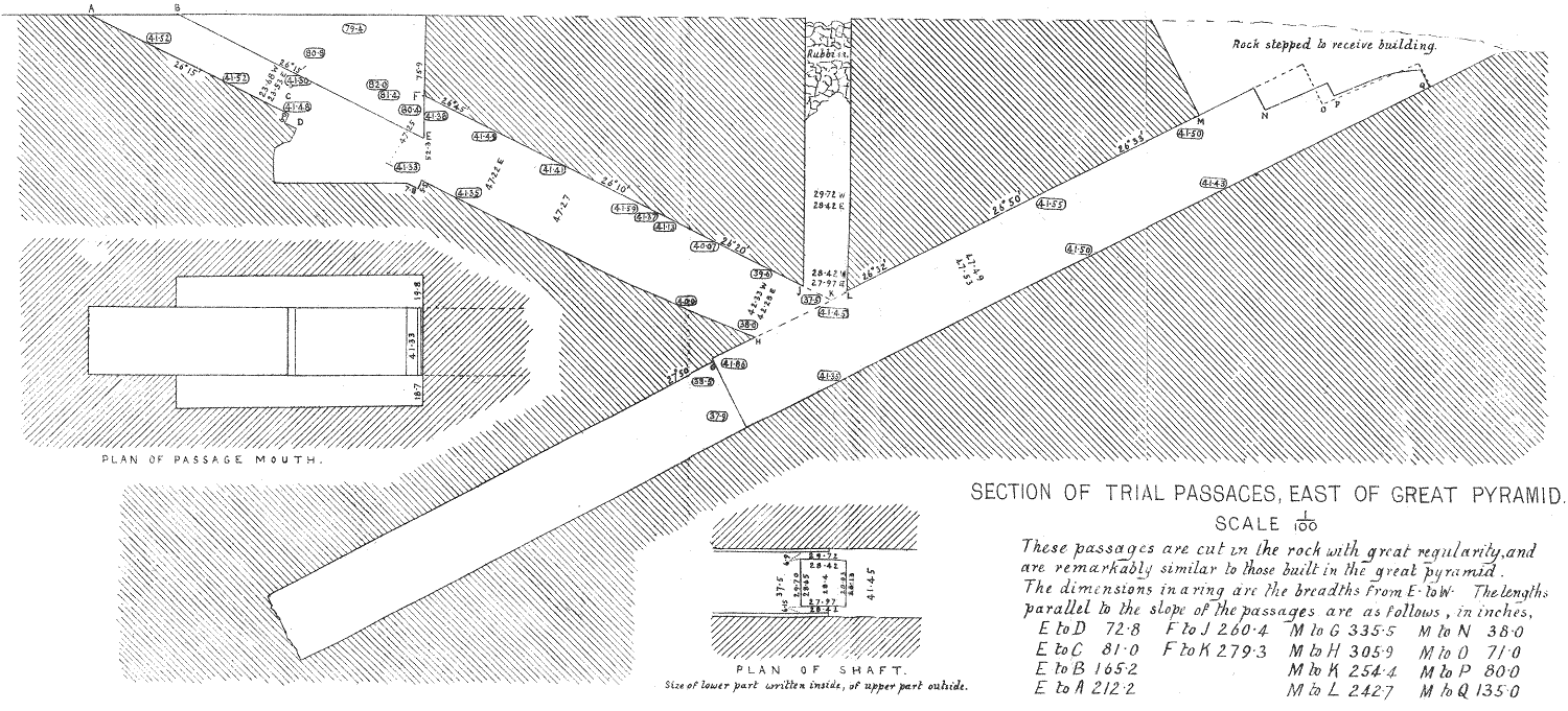 Plan de la maquette à l'est de la pyramide de Khéops